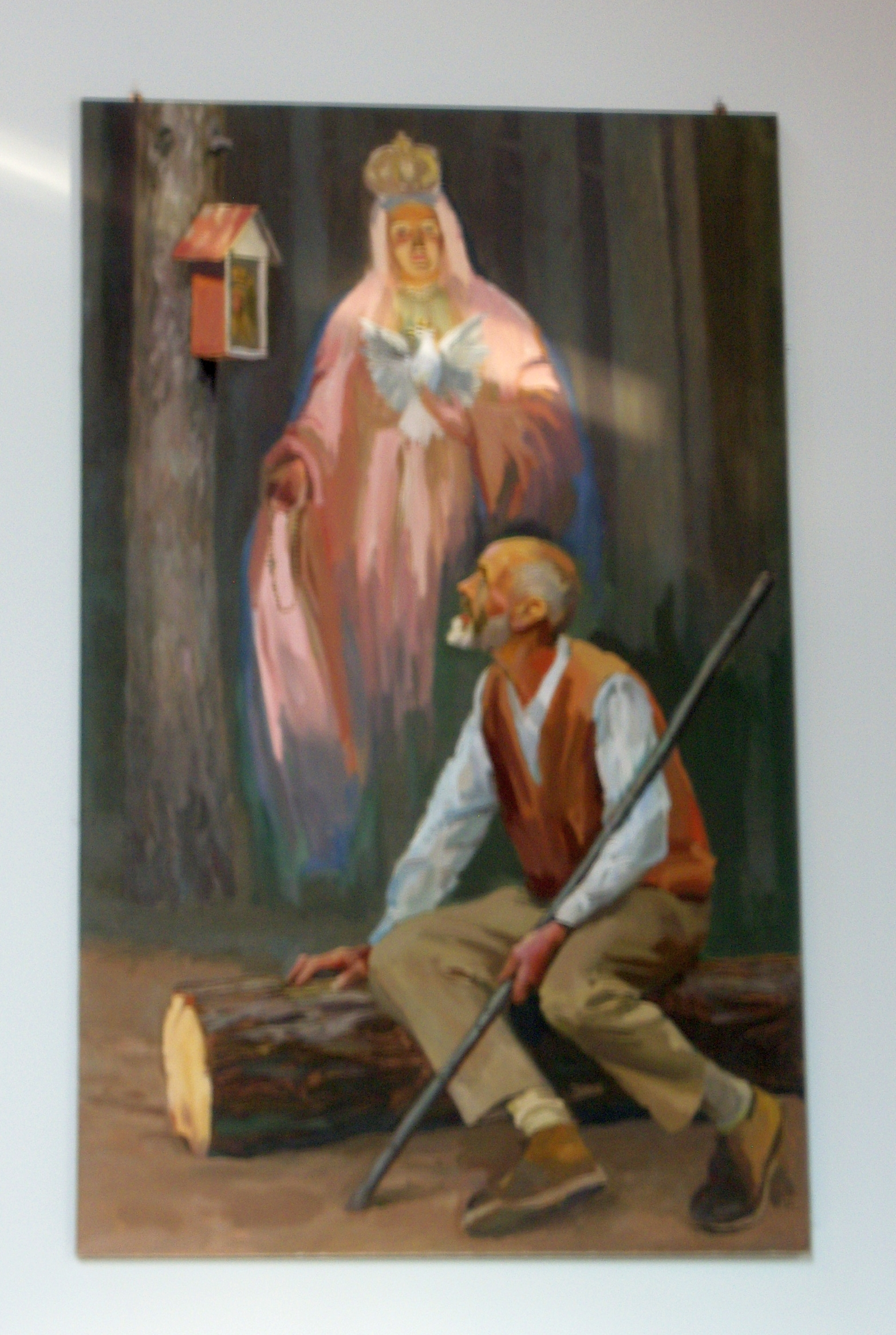 Obraz objawienia się Matki Boskiej pasterzowi Mikołajowi Sikatce znajdujący się w kościele Matki Bożej Dziesięciu Cnót Ewangelicznych w Lesie Grąblińskim